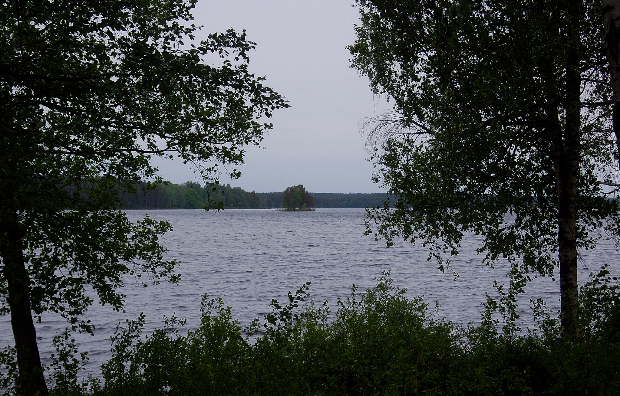 Bodasjön sedd från Ramundeboda kloster.